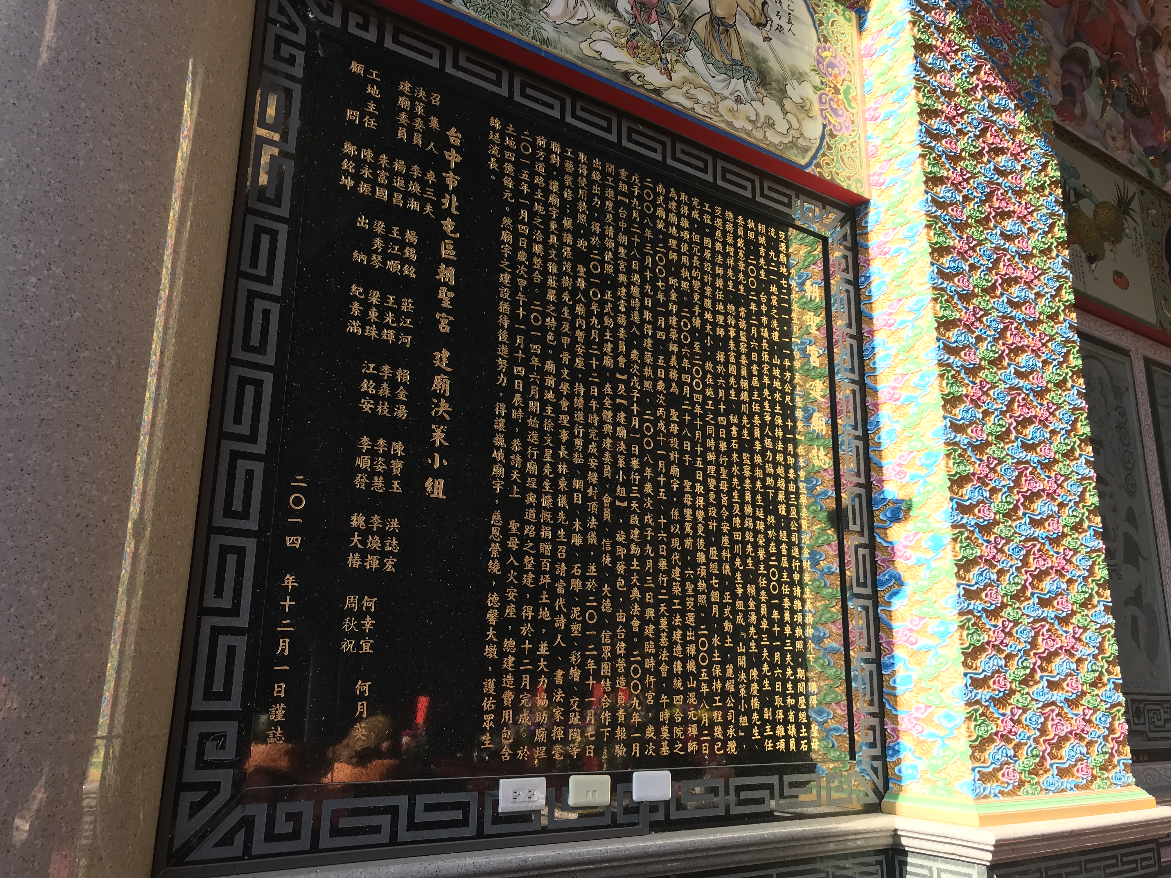 中文（台灣）: 台中朝聖宮建廟誌